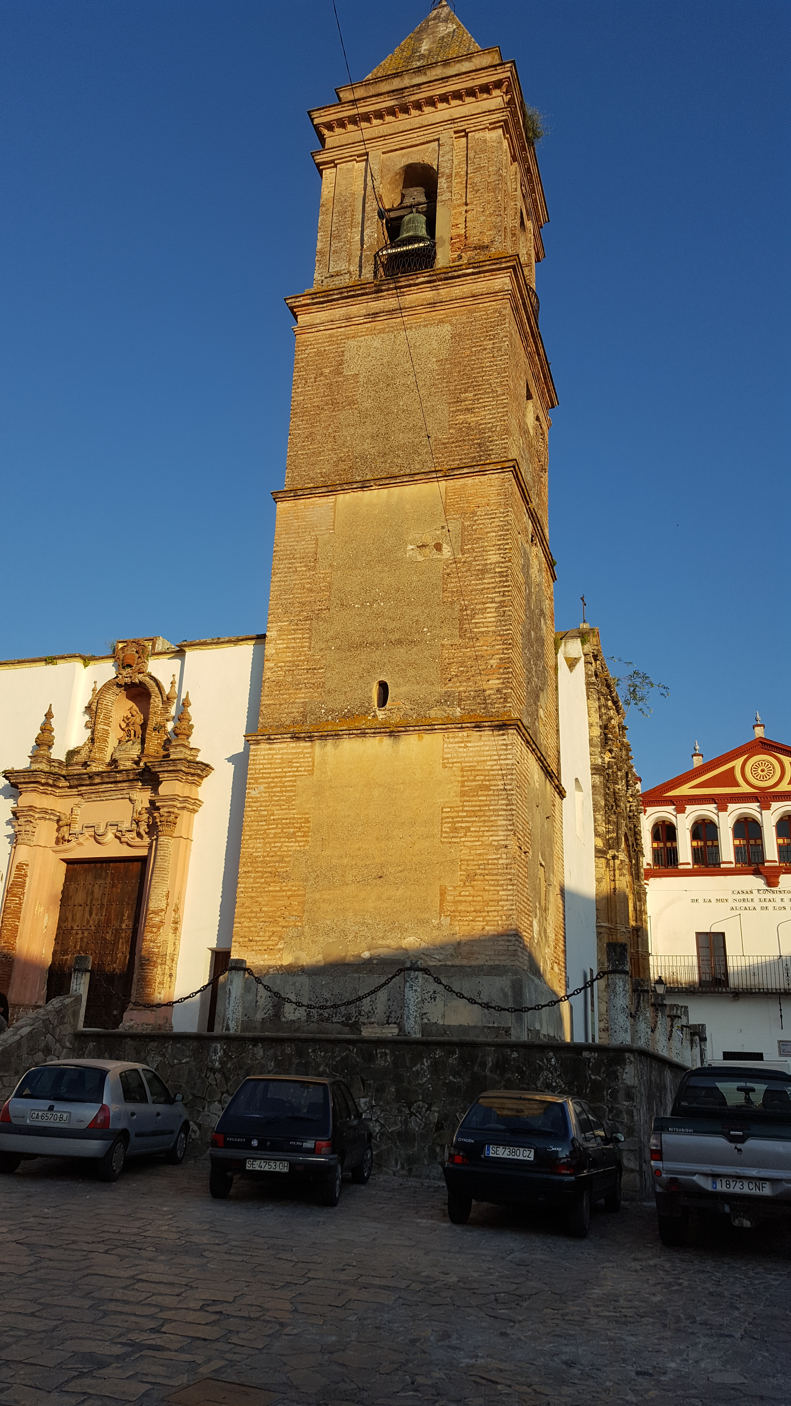 Iglesia de San Jorge, Alcalá de los Gazules Cádiz España